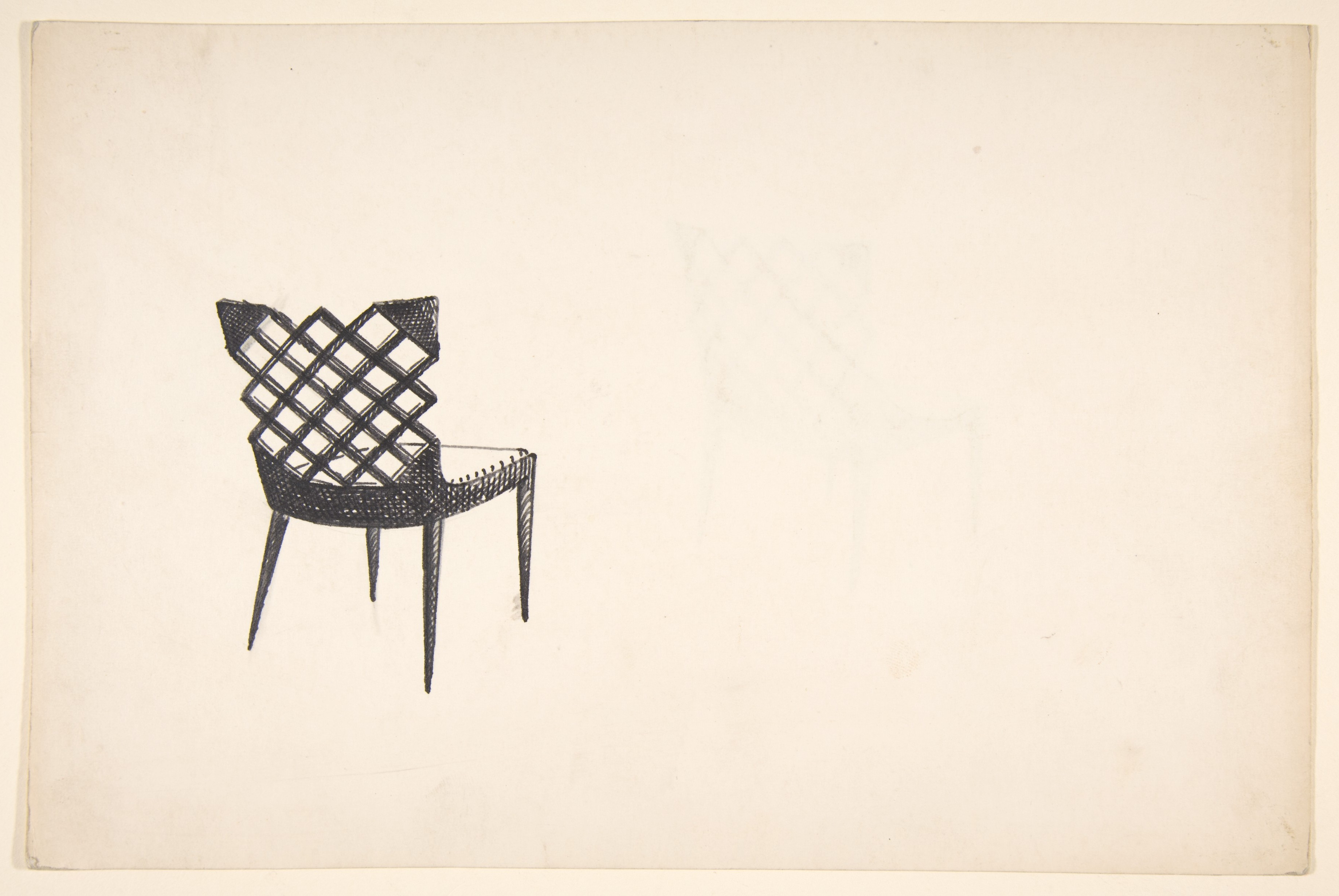 Drawing; Drawings